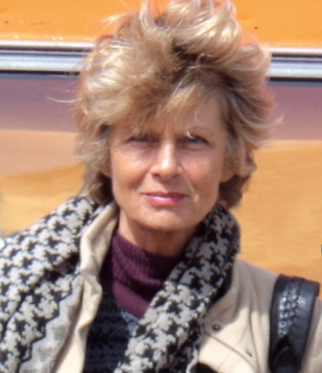 Brigitte Streubel, April 2012